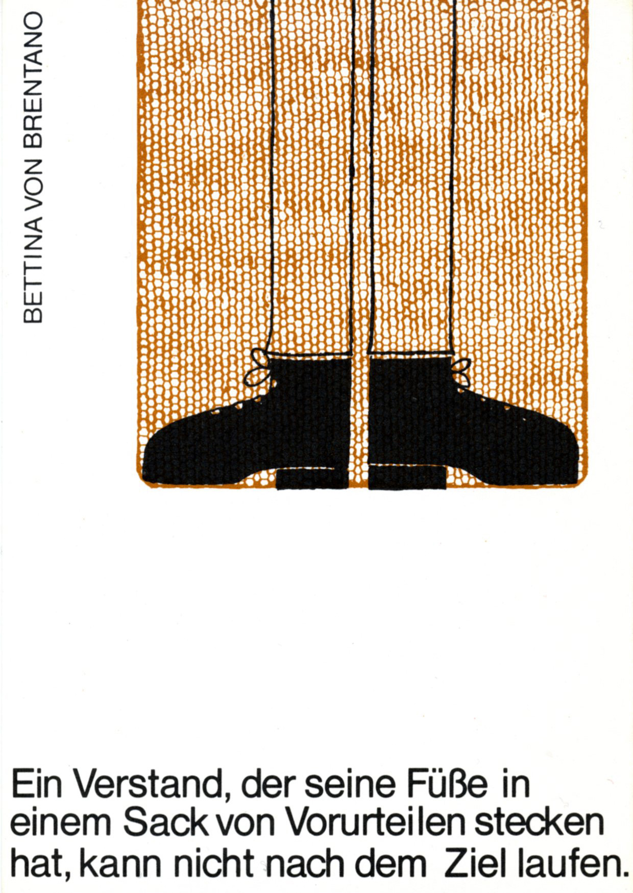 Illustration und Zeichnung von Hanni Kowalczyk